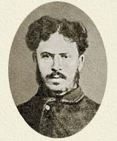 Savelij Solomonovič Zlatopol'skij (1855-1885)